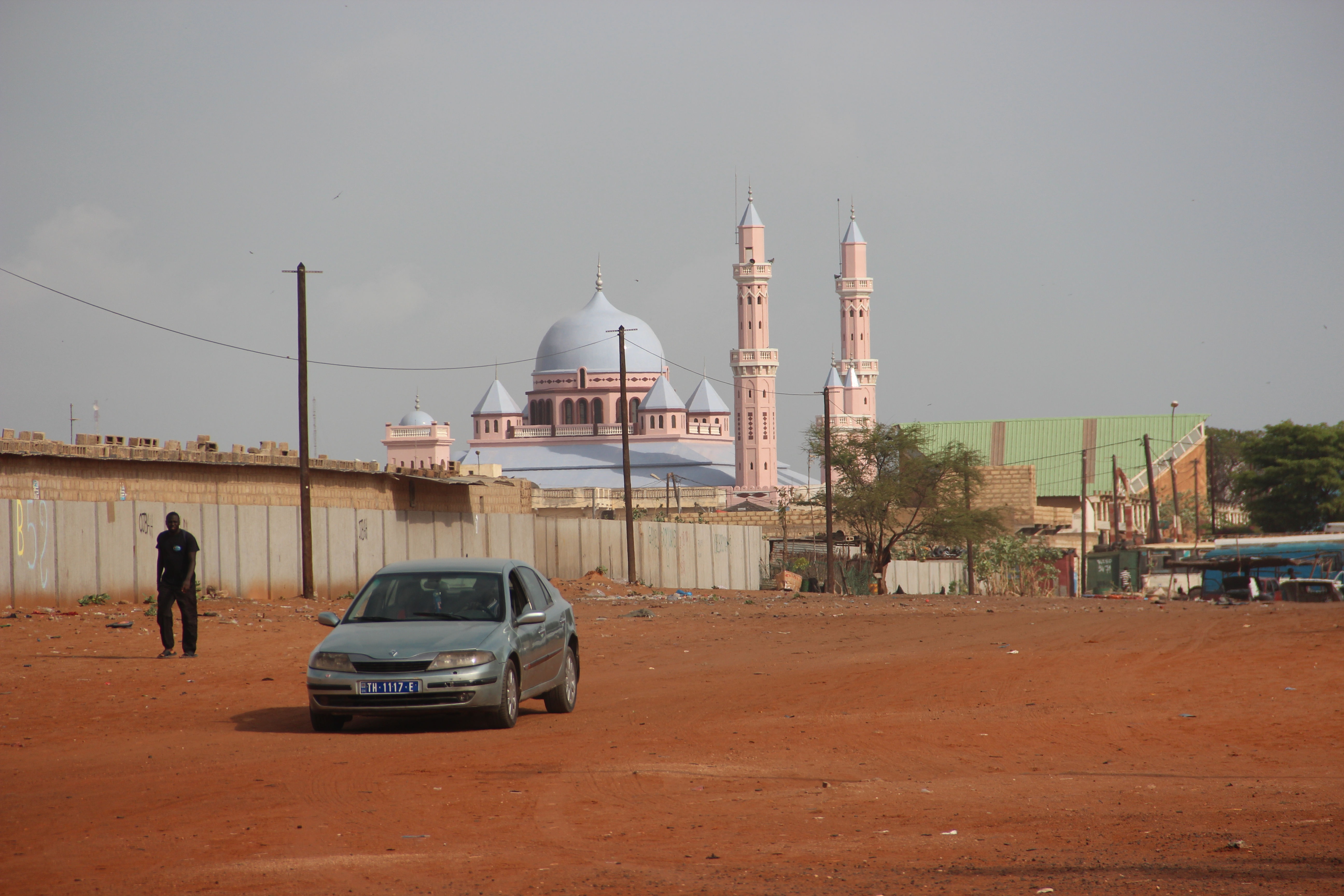 La Grande Mosquée Serigne Saliou Mbacké de MbourWeblink